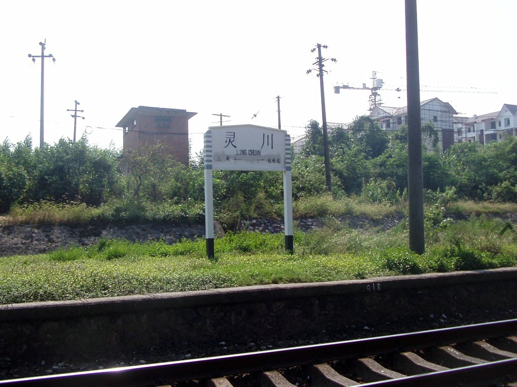 灵川站站牌，拍摄于2010年